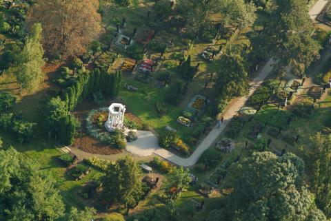 Szatmárcseke, Hungary, aerialphotography